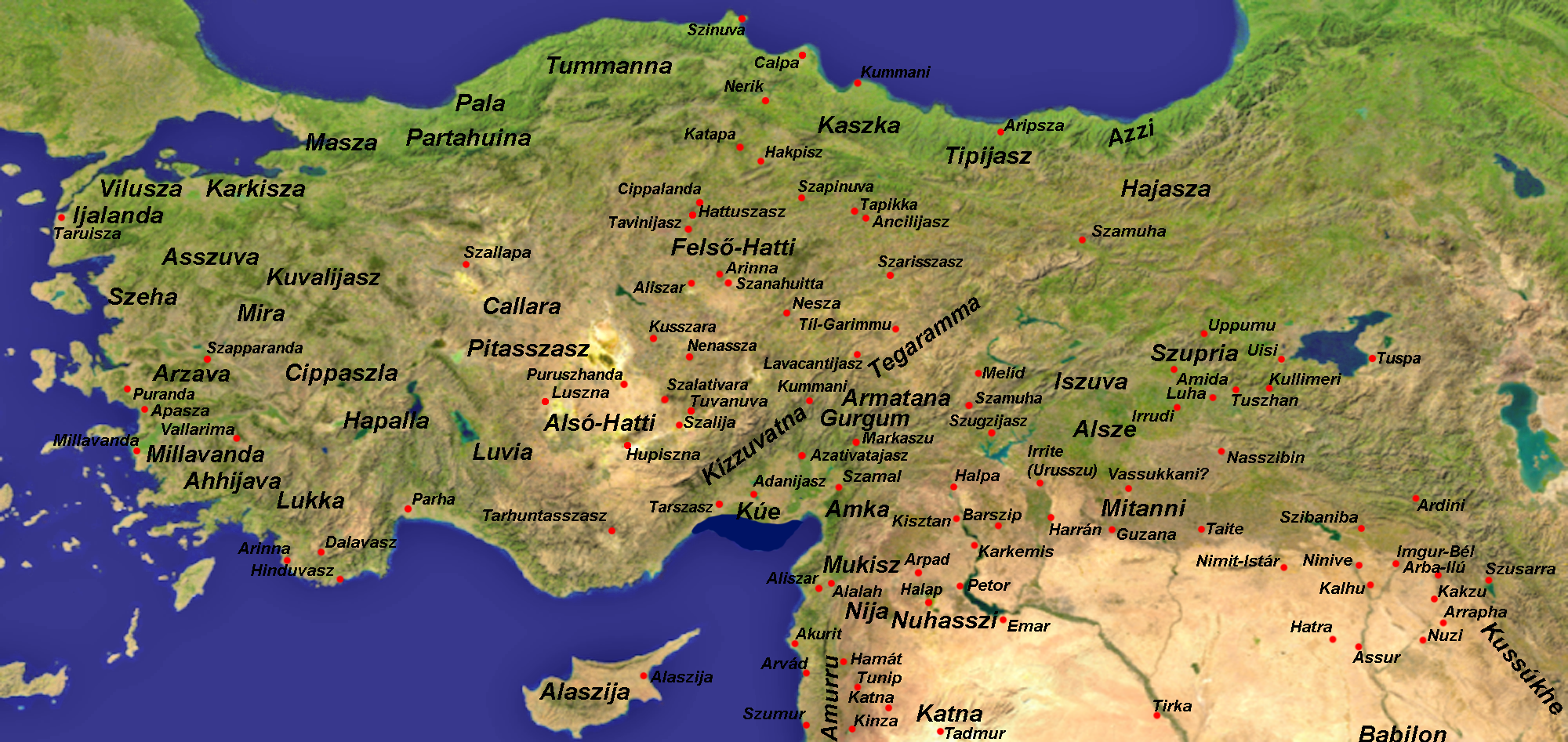 Anatólia térkép az i. e. 2. évezred folyamán (hettita idők településtérképe). Ezen a térképen a közigazgatási egységek és a települések nevei hettita szempontból, hettita kiejtés szerint kerültek feltüntetésre